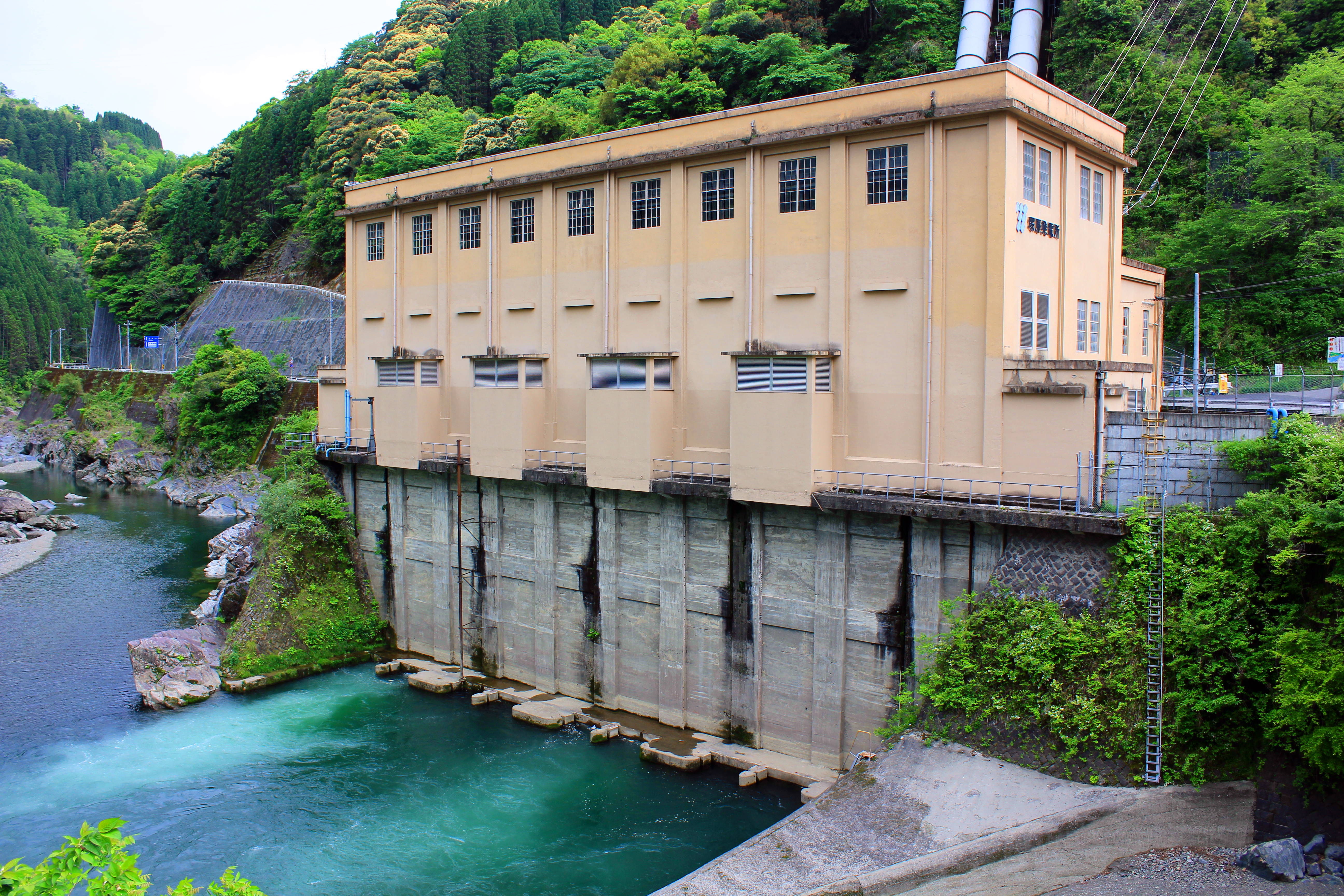 塚原発電所（宮崎県・耳川。九州電力株式会社管理）